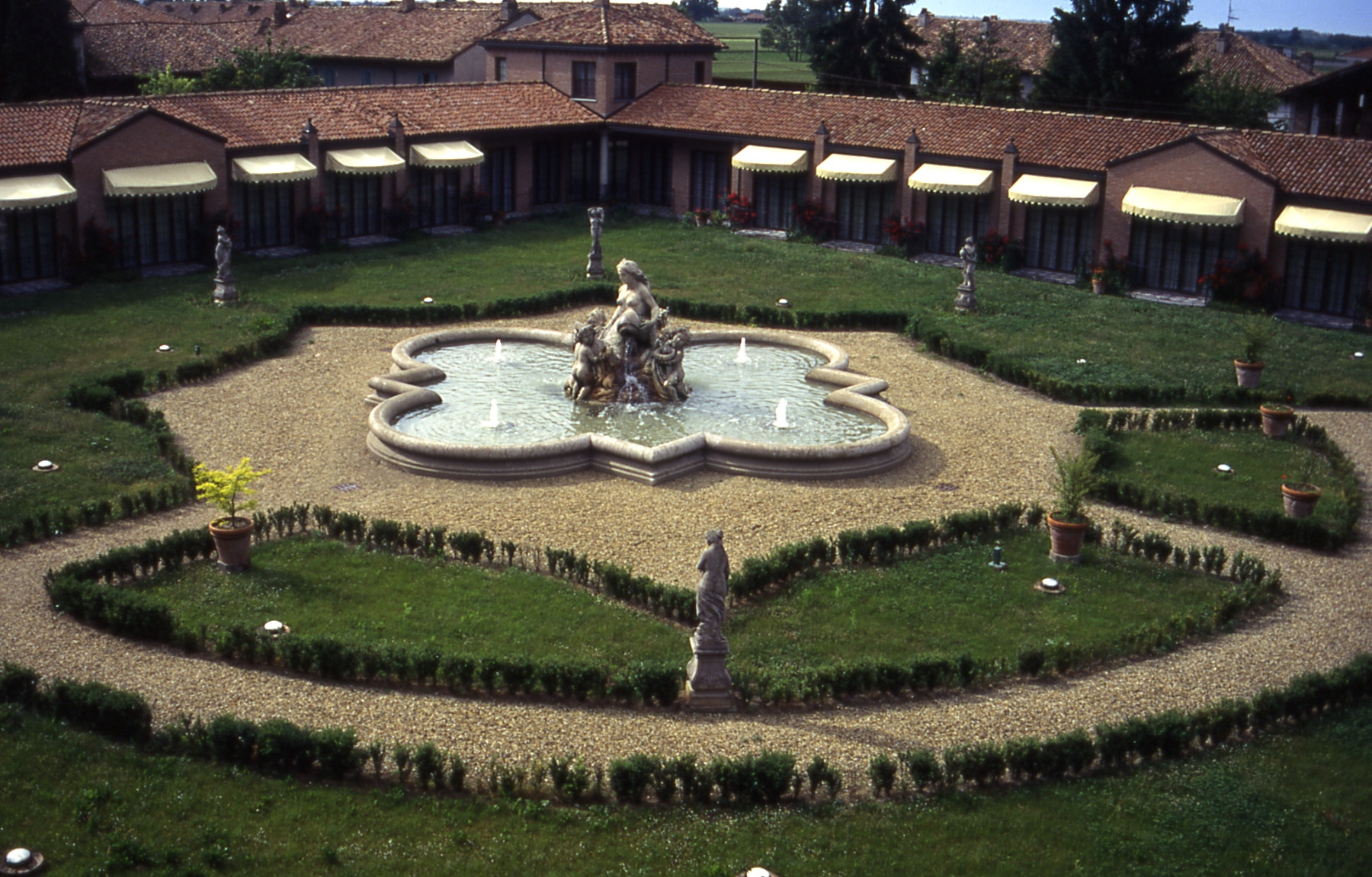 Castello di San Gaudenzio Cervesina 1996Garten